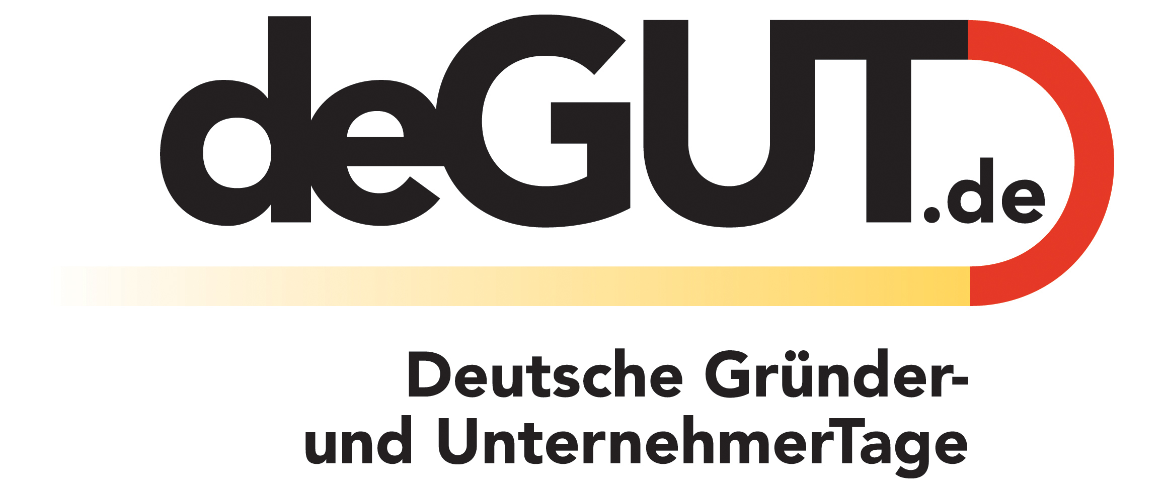 deGUT_Logo